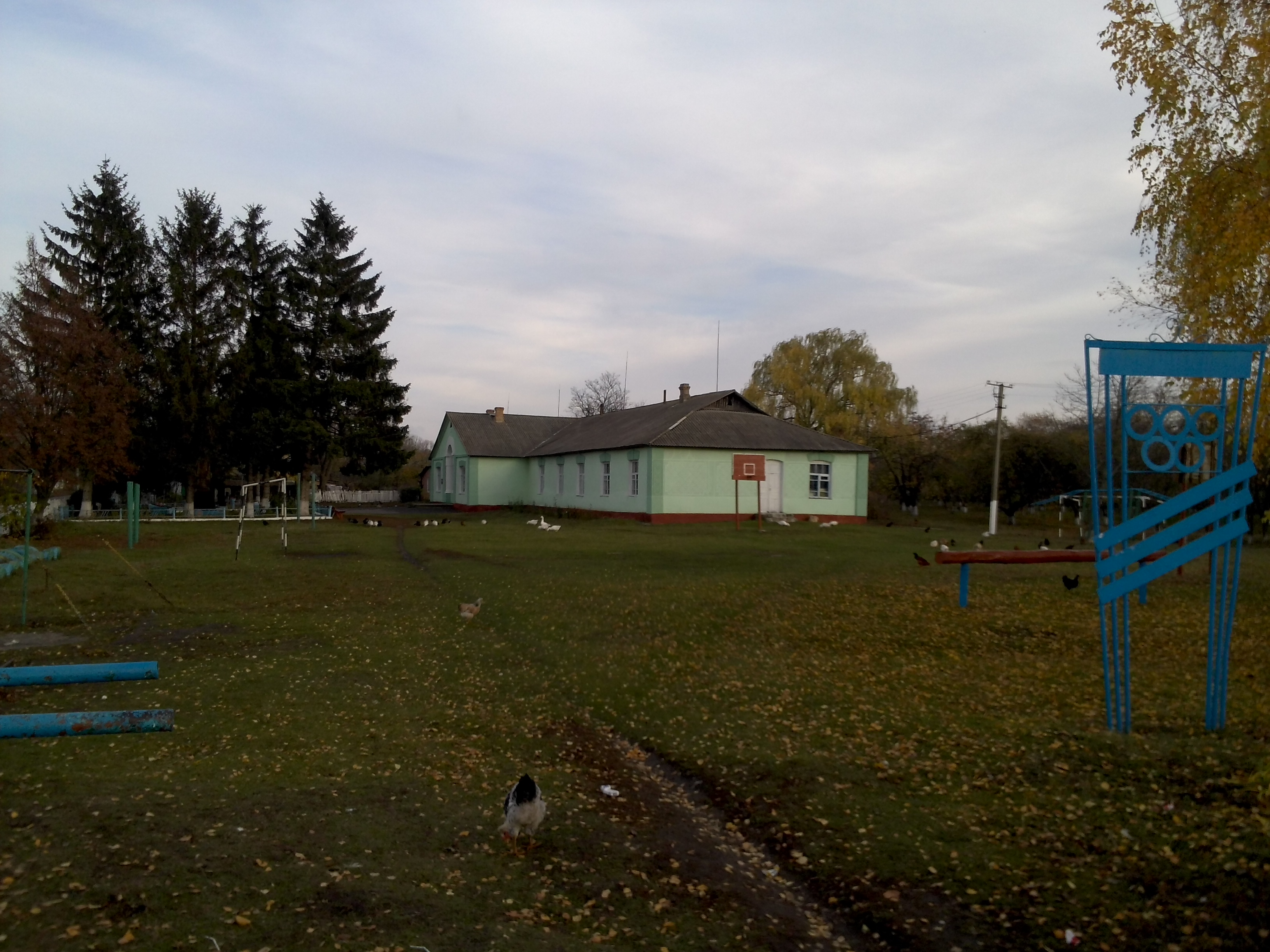 с. Вербівка. Школа